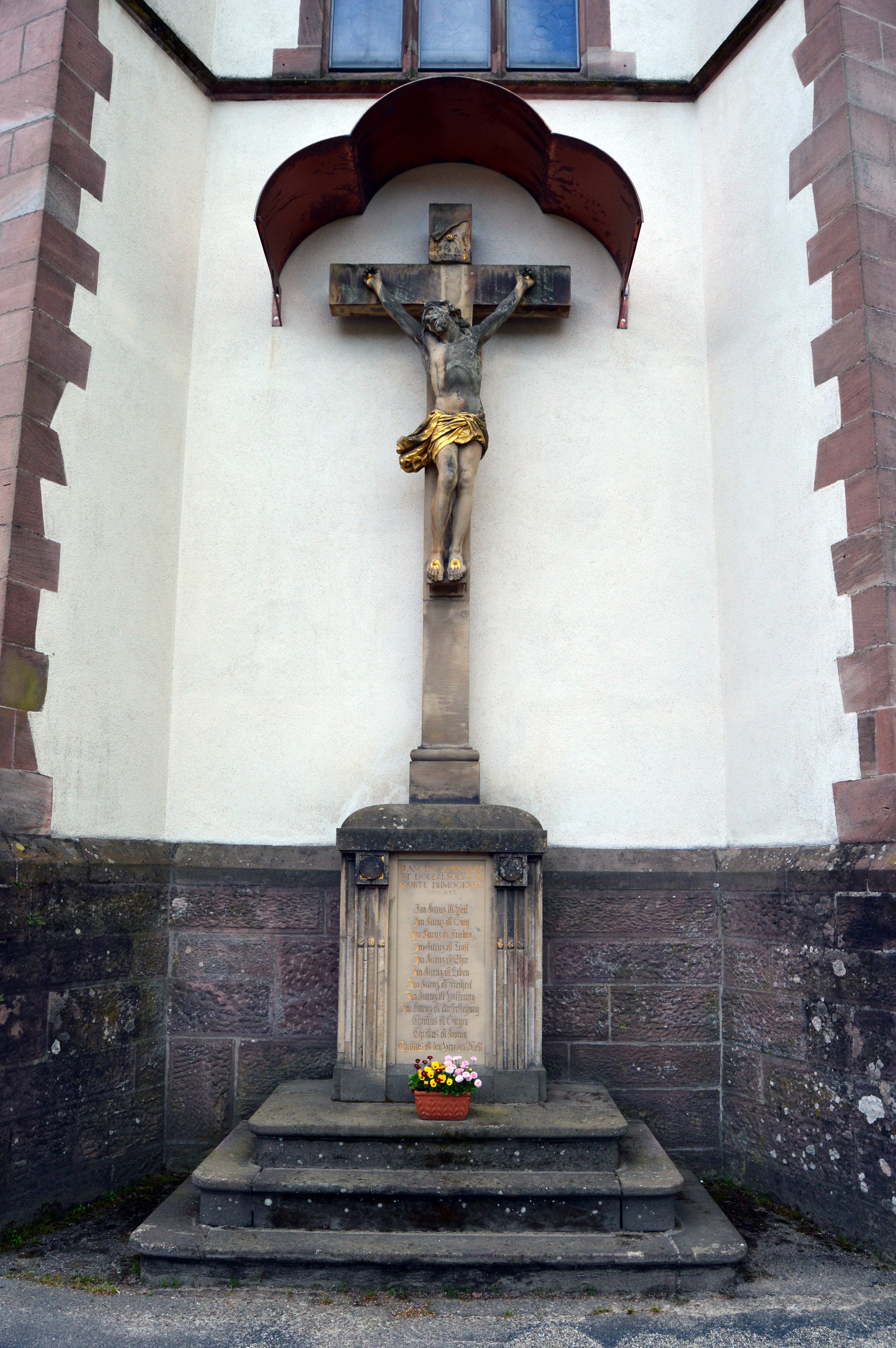 Das Käshammersche Kreuz